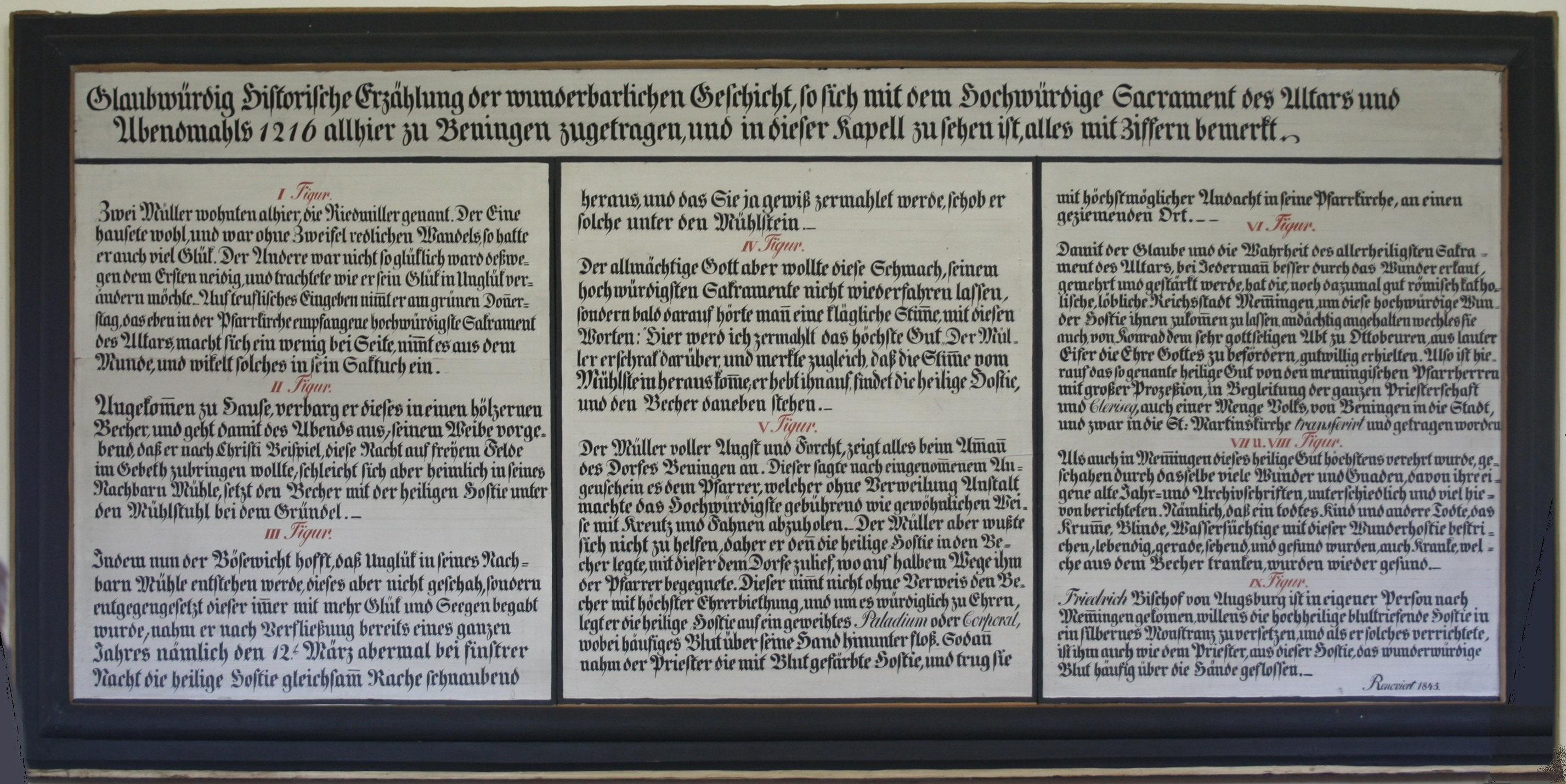 Beschreibung des Hostienwunders in der Riedkapelle in Benningen